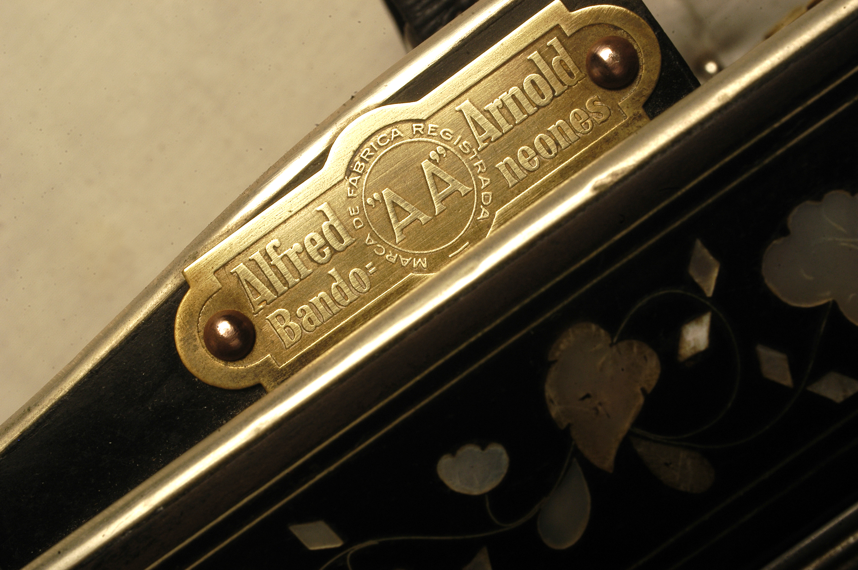 Détail d'une estampille Alfred Arnold modéle Doble A